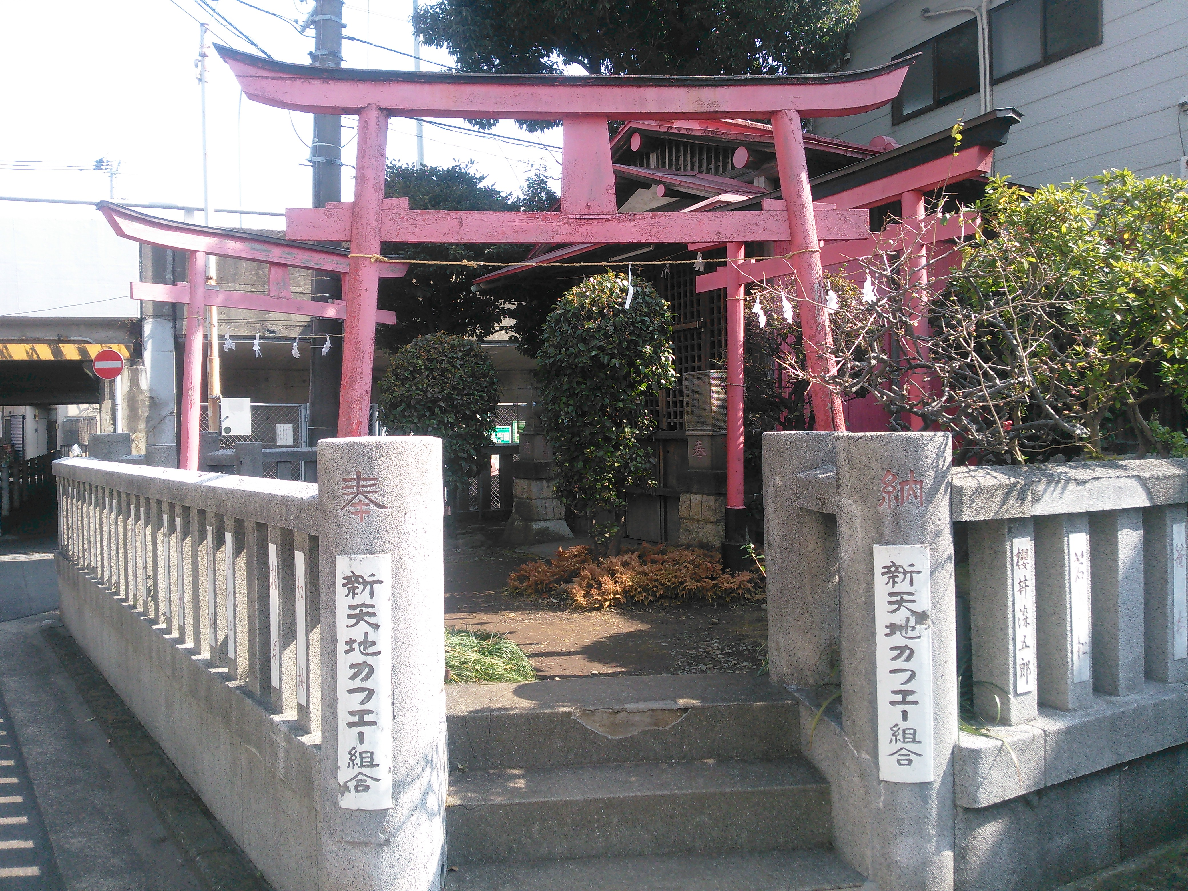 横浜市西区南浅間町、新天地桜会稲荷神社